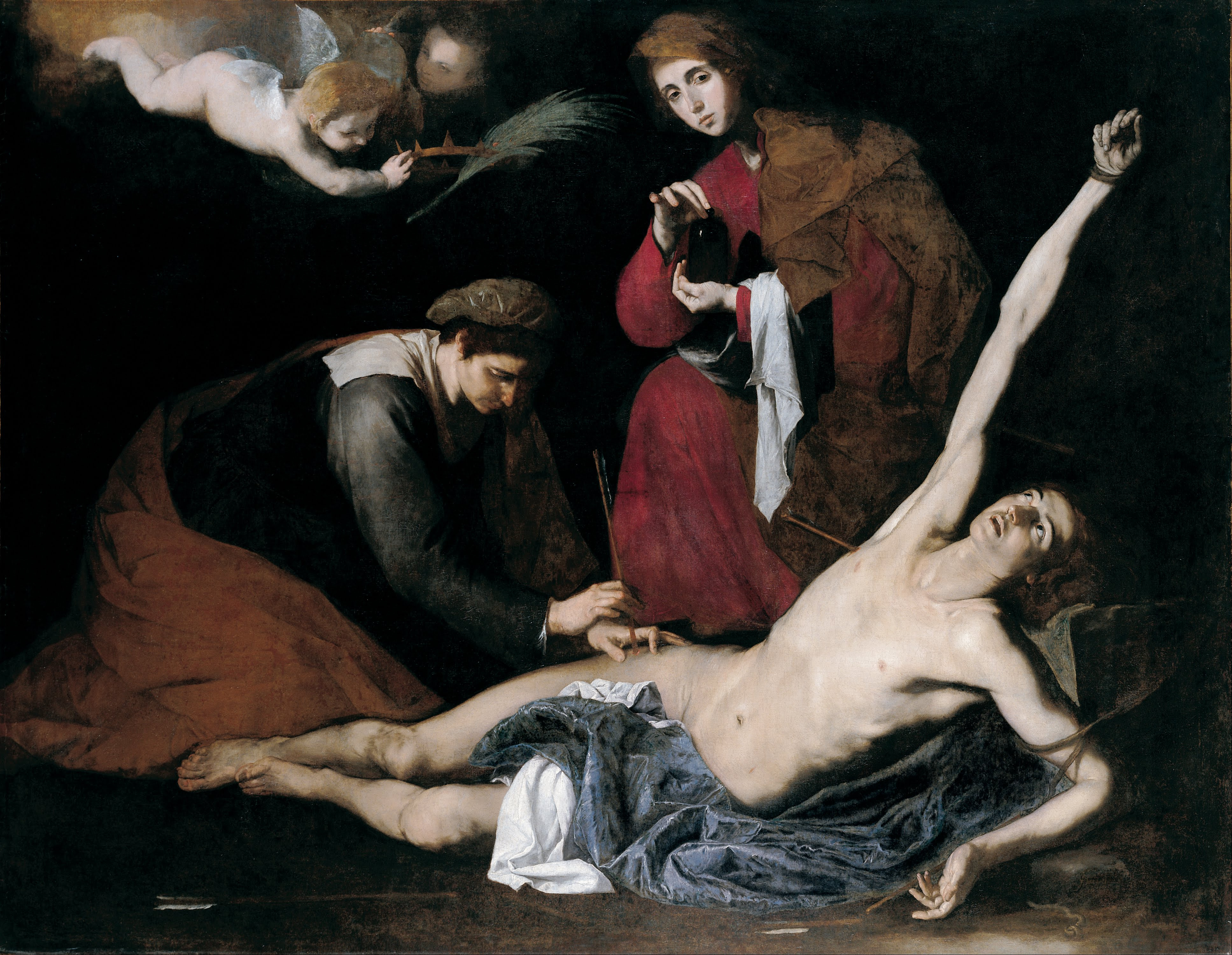 El lienzo muestra al mártir cristiano San Sebastián, que moriría asaeteado en el año 288 d. C. por su condición de cristiano, siendo atendido y curado por las santas mujeres Irene y Lucila.